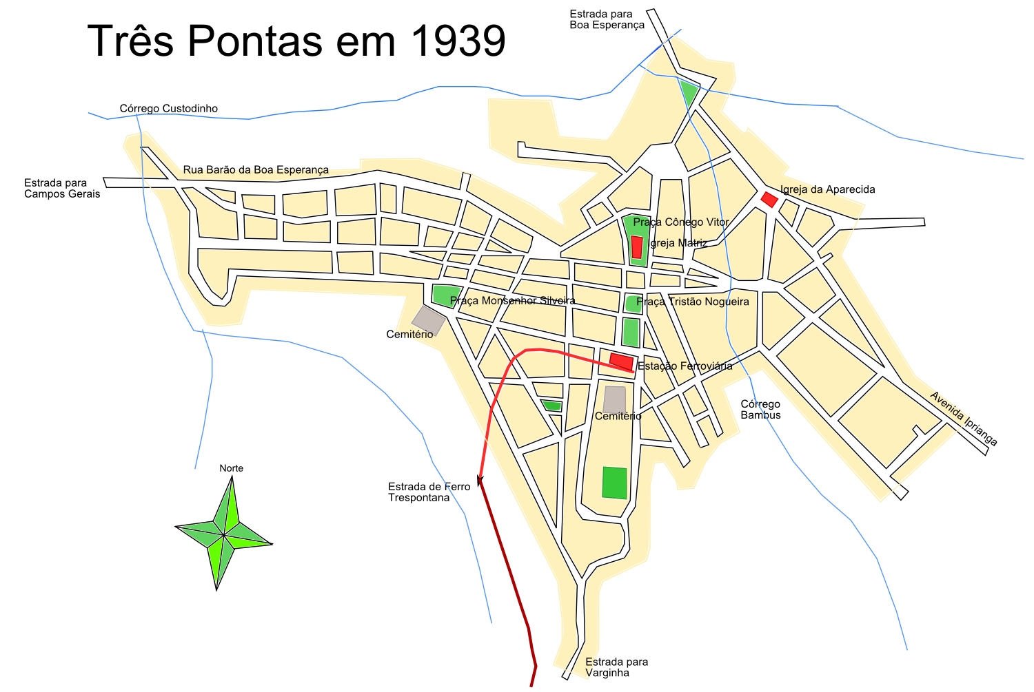 Descrição das ruas da cidade no ano de 1939.